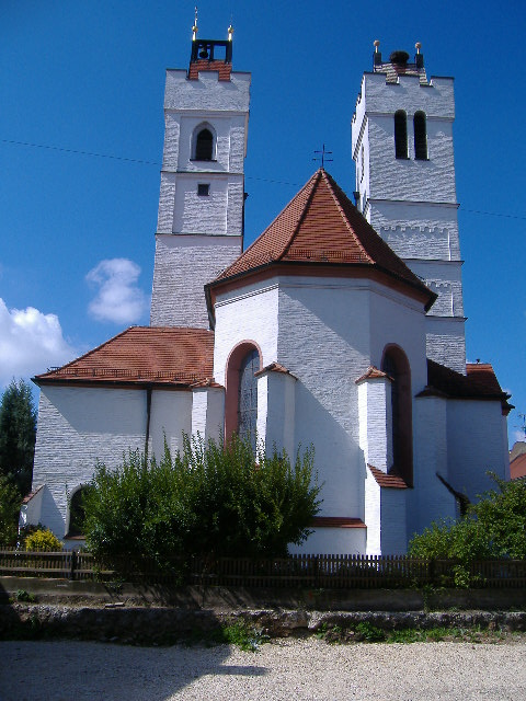 Wertingen